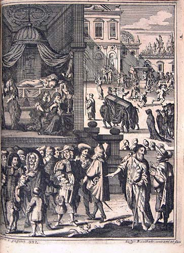 El mundo por de dentro, Amberes, por Henrico y Cornelio Verdussen.